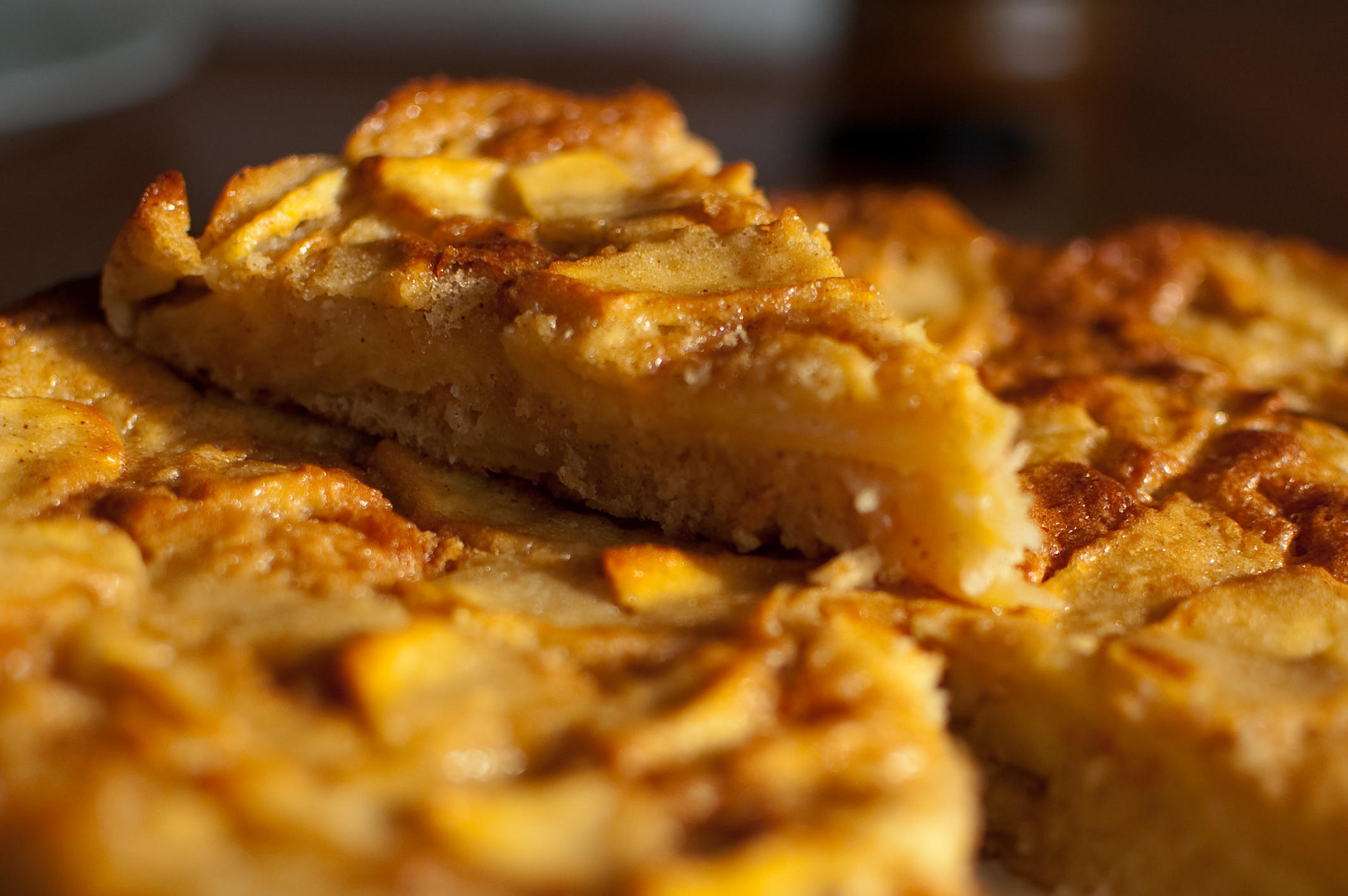 torta di mele e cannella#1